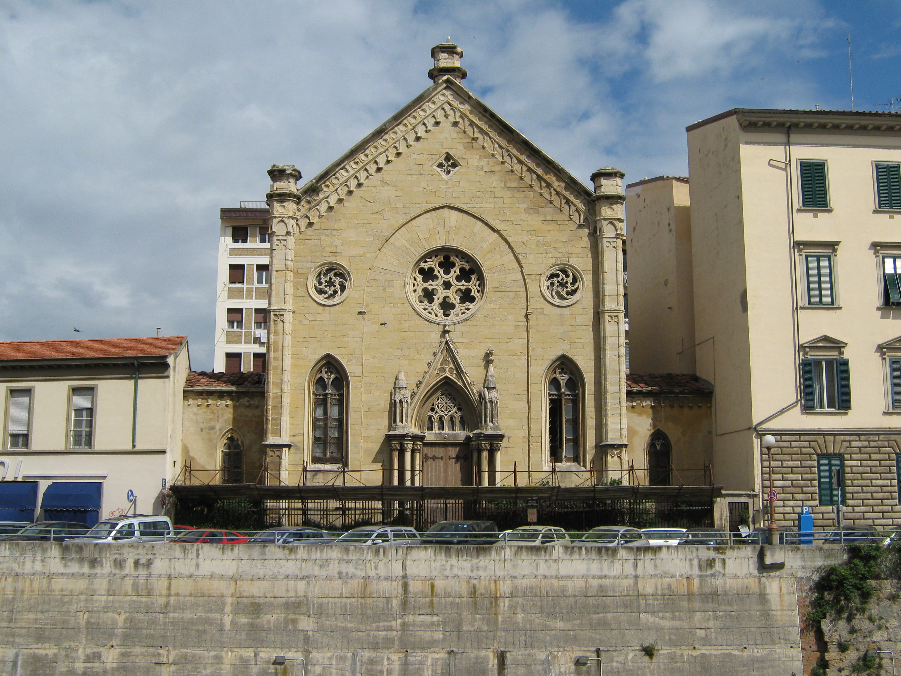 Livorno: Tempio della Congregazione Olandese Alemanna. Stato di conservazione al giugno 2008. Si notano in particolare le bifore distrutte nelle ali laterali, i pinnacoli crollati sopra il portale d'ingresso, il tetto crollato nel corpo laterale sinistro ed il Fosso Reale ancora lasciato in cemento armato a vista.